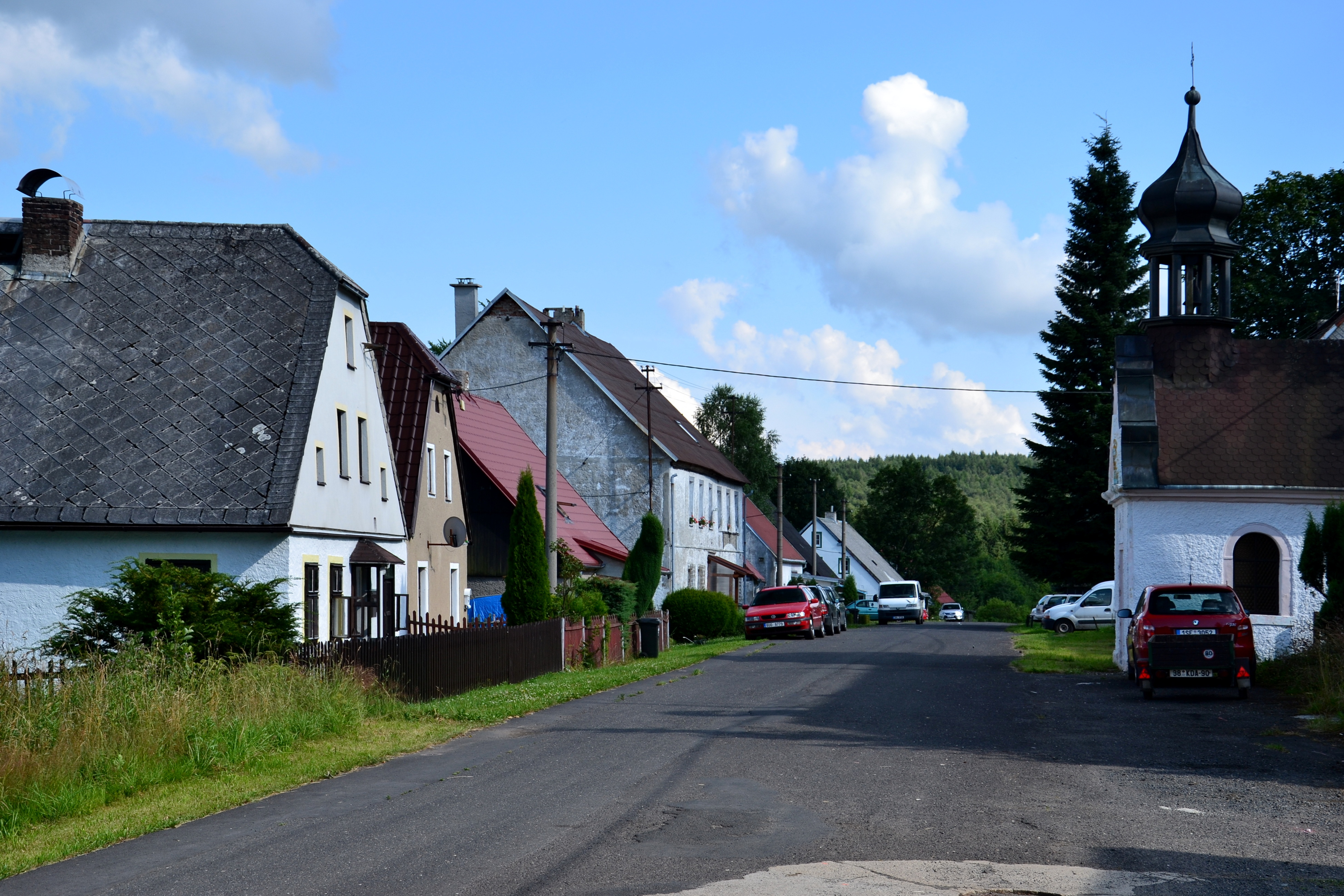 Domy naproti kapli